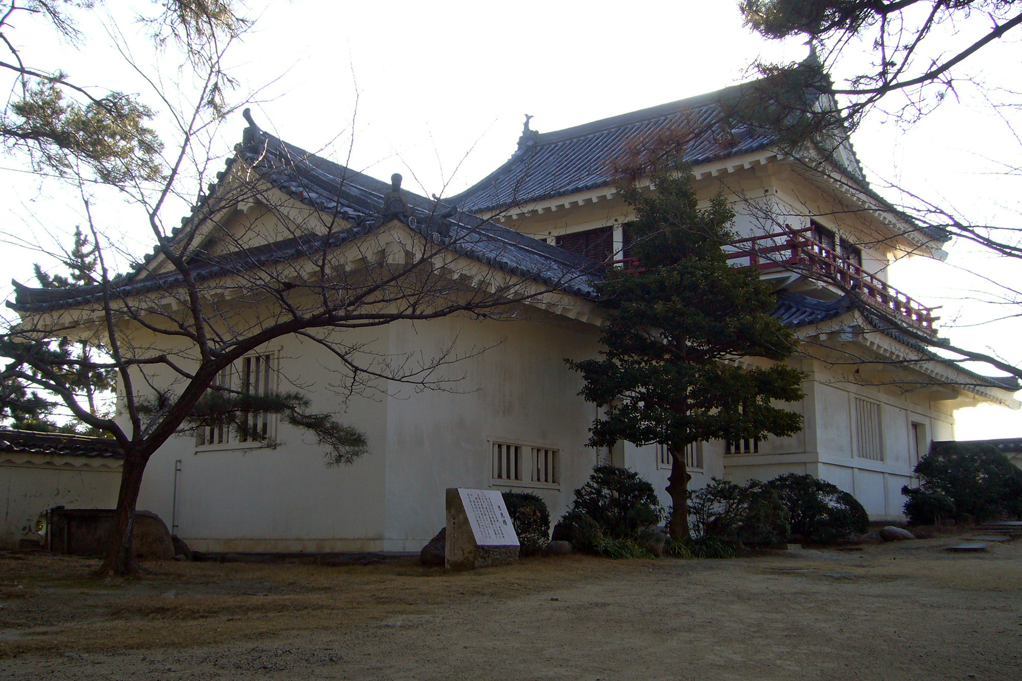 Fukuyama Castle "Tsukimi-yagura" in Fukuyama, Hiroshima prefecture, Japan